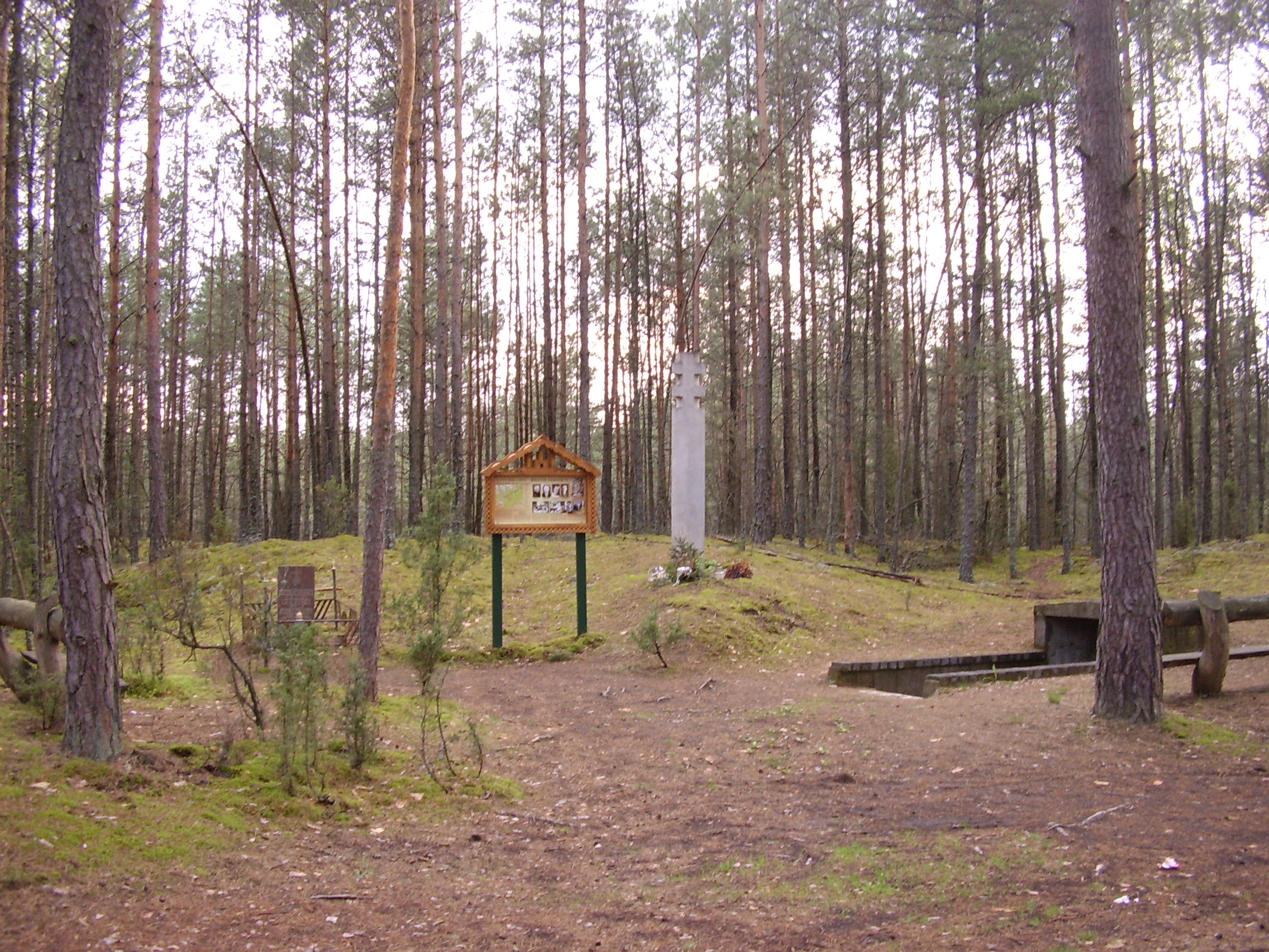 Partizanų žeminė Dzūkijoje. Autorius: zove.mykolas